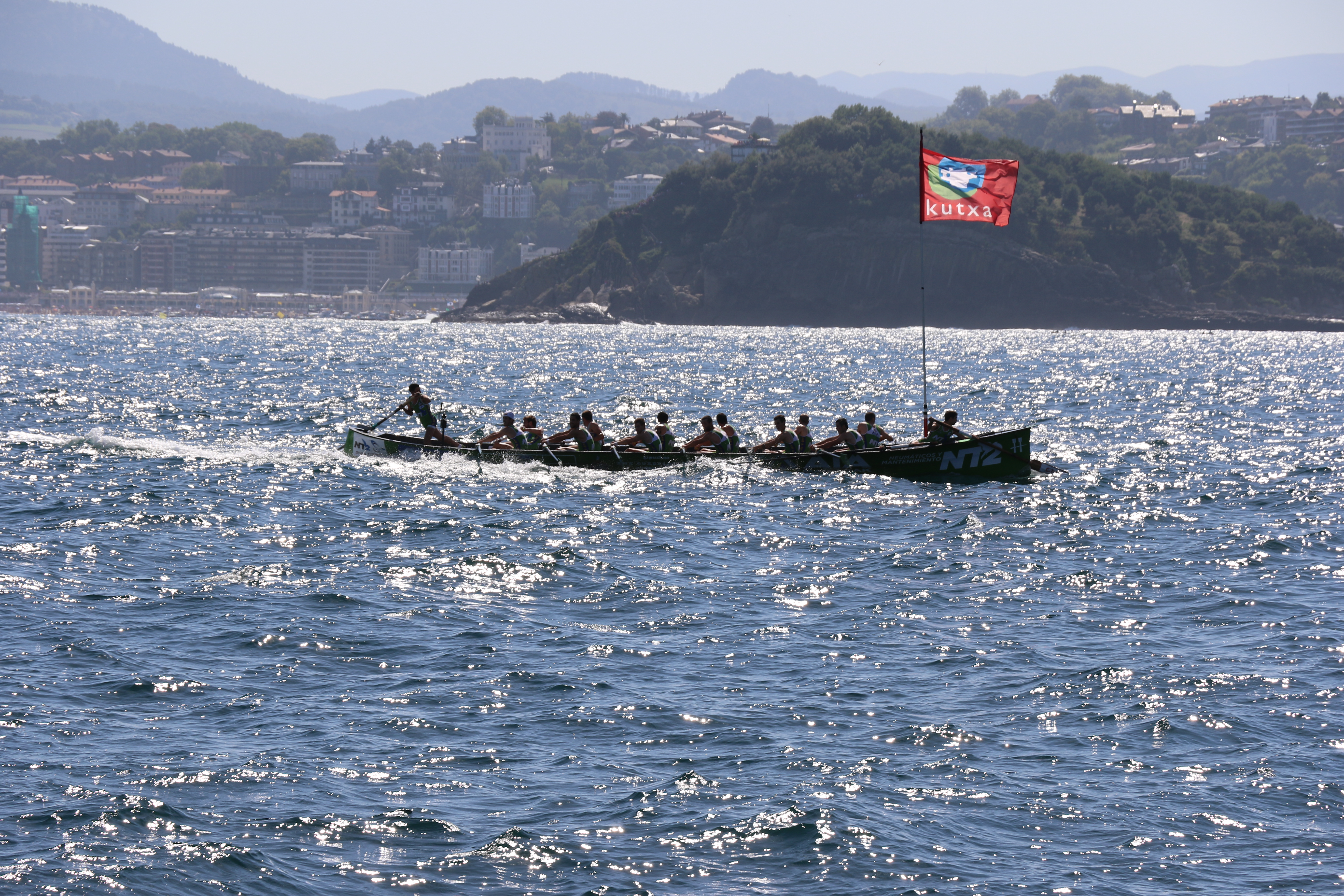 kontxa-ziaboga